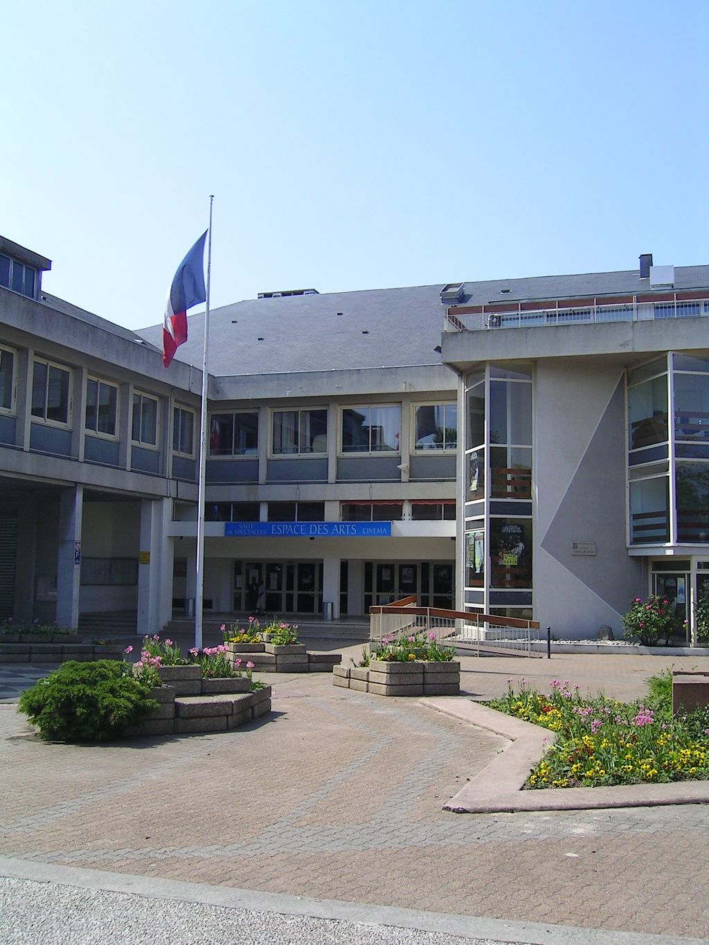 Espace des Arts, centre cullturel, place Charles de Gaulle Photo personnelle (own work) de Marianna